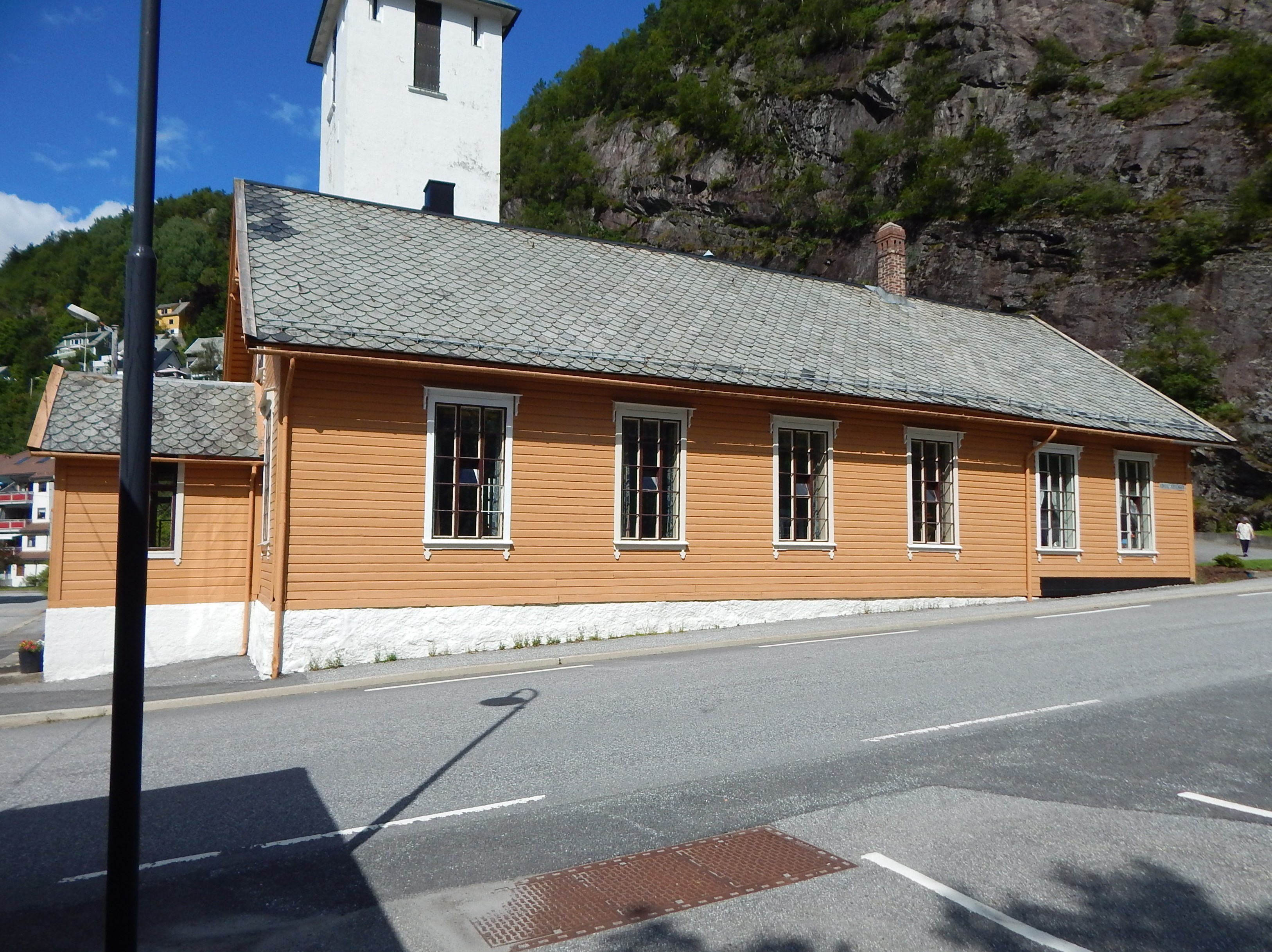 Bråtet (fylkesvei 314) forbi Dale kirke i Vaksdal